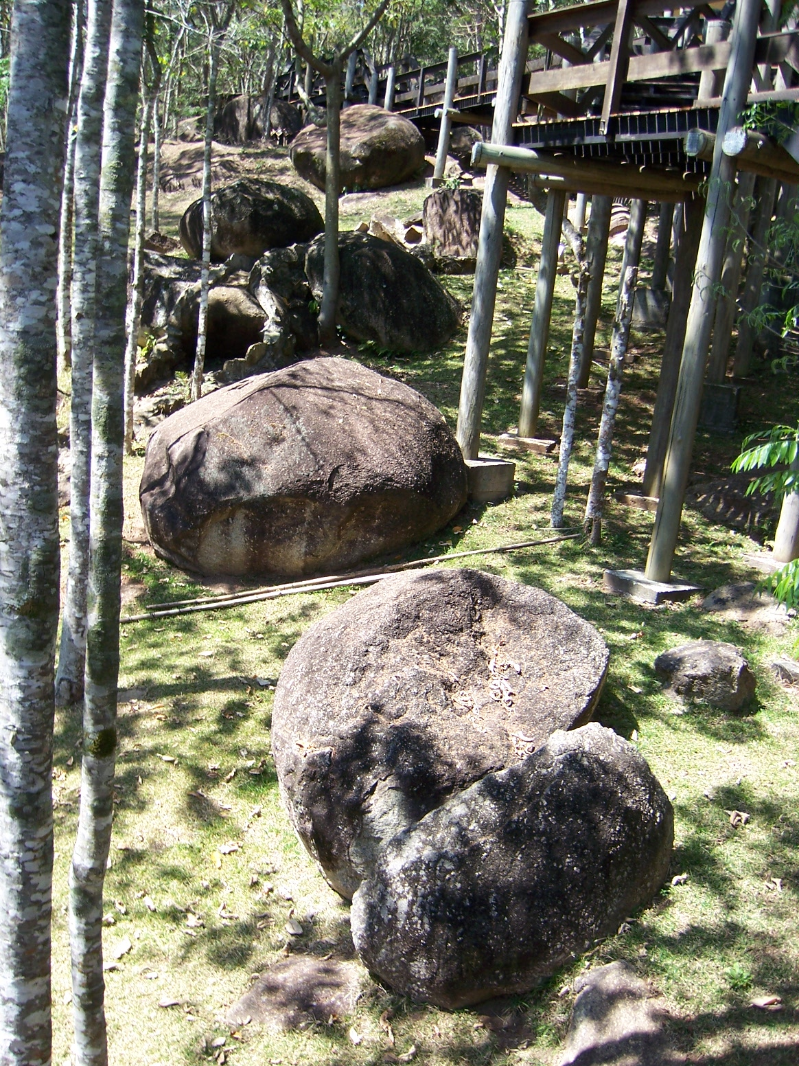 Pedras no Parque da Pedra Montada.